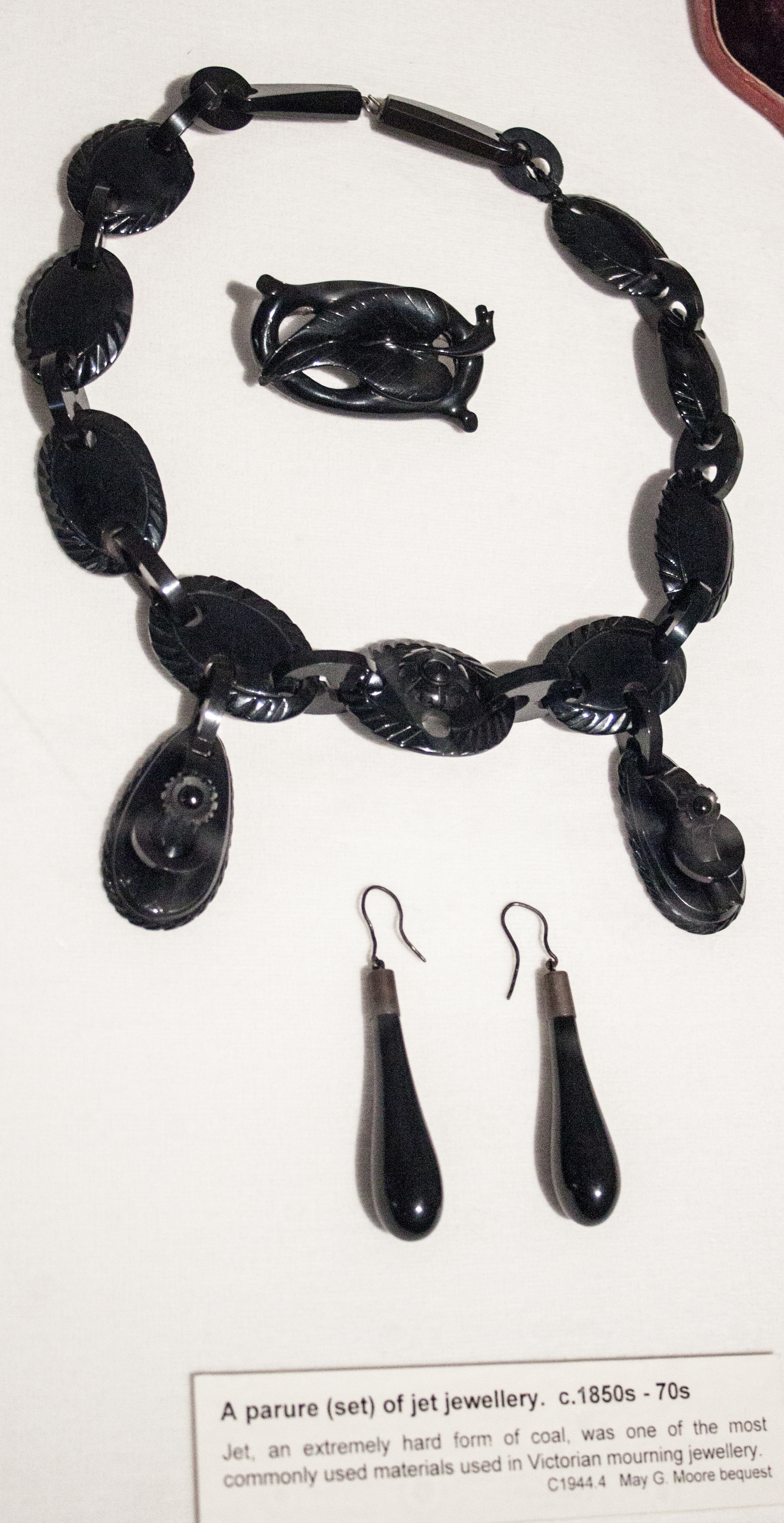 Set of jet jewellery